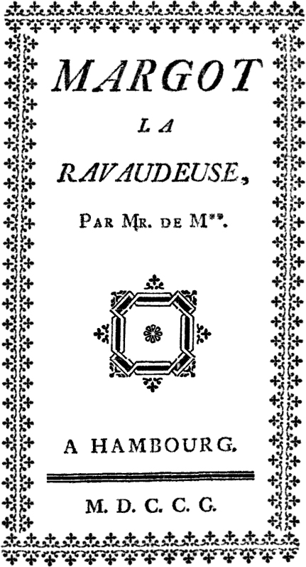 Title page of Margot la ravaudeuse, by Louis-Charles Fougeret de Monbron (1706-1761)